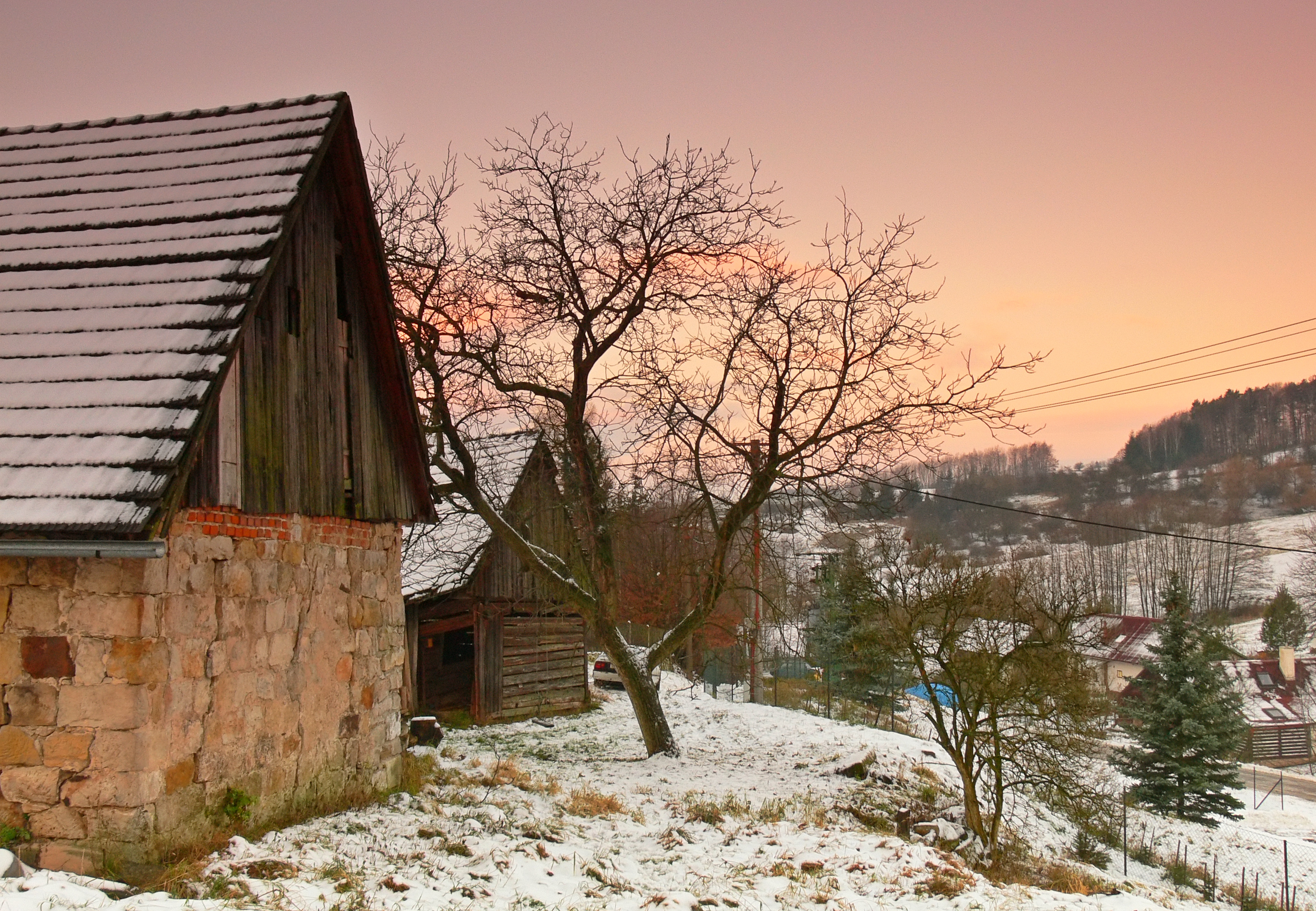 Holenice, Czech Republic